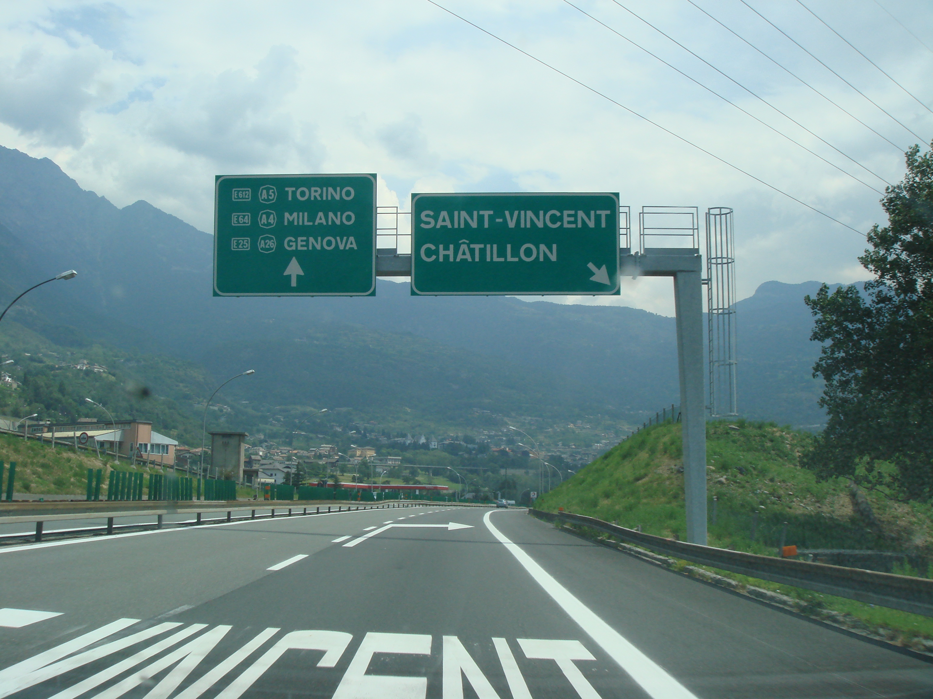 Autoroute italienne A5 / E25